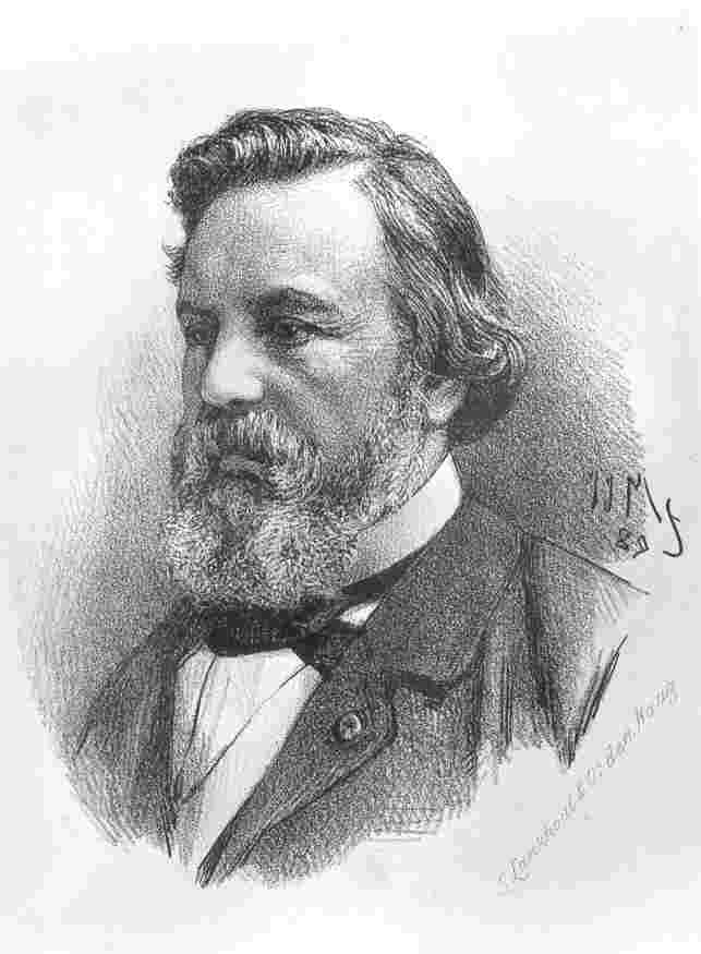 Prof. dr. F.C. Donders (1818-1889) op een litho uit 1889 (Coll. RHC Tilburg).